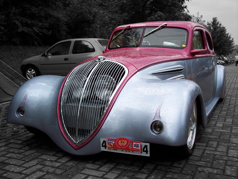 Peugeot 402 Streetrod